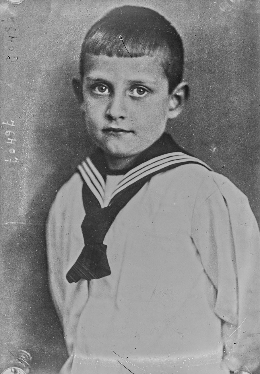 Archiduc Franz Joseph d'Autriche Toscane.